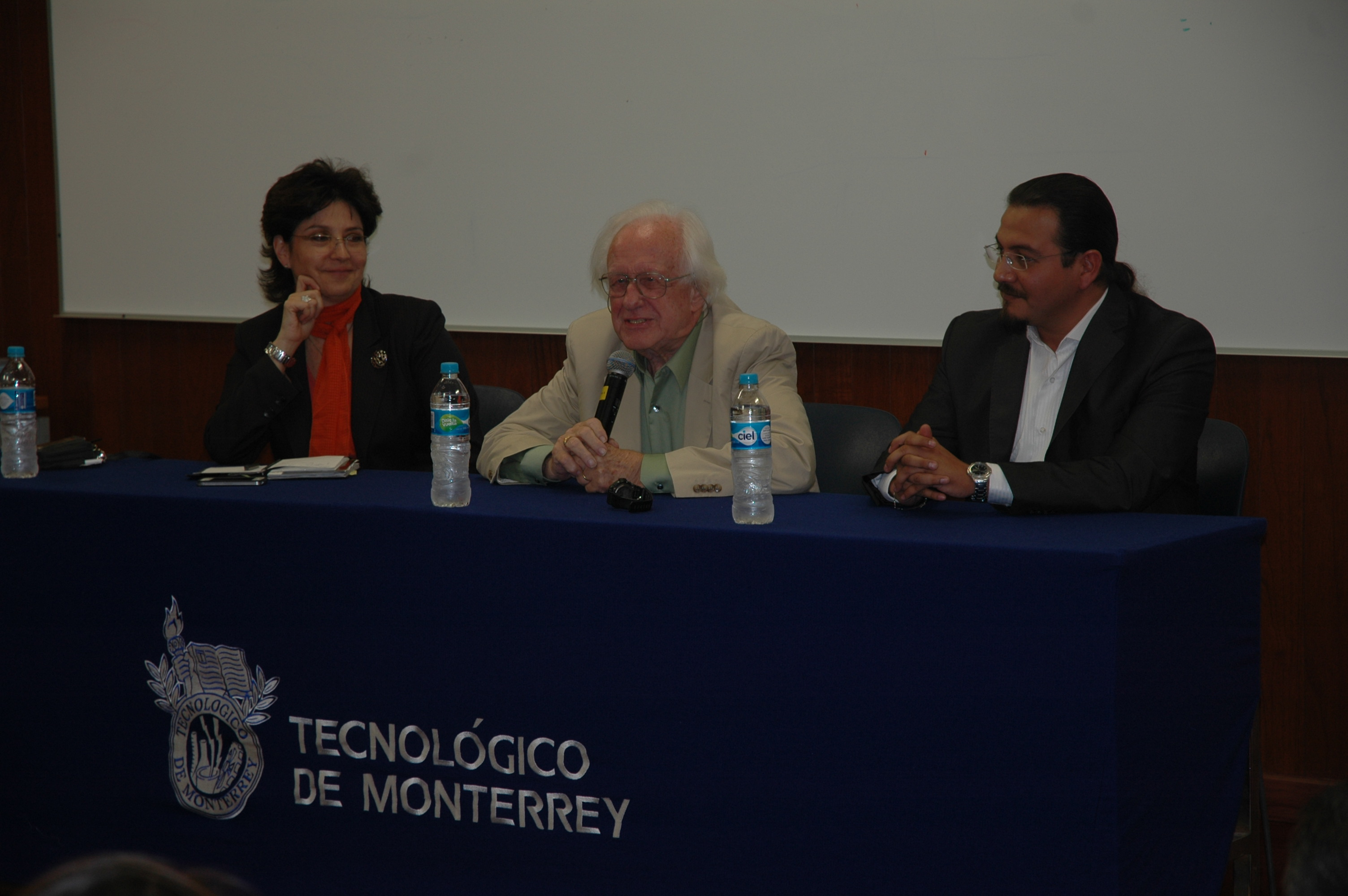 Johan Galtung en el ITESM Campus Ciudad de México